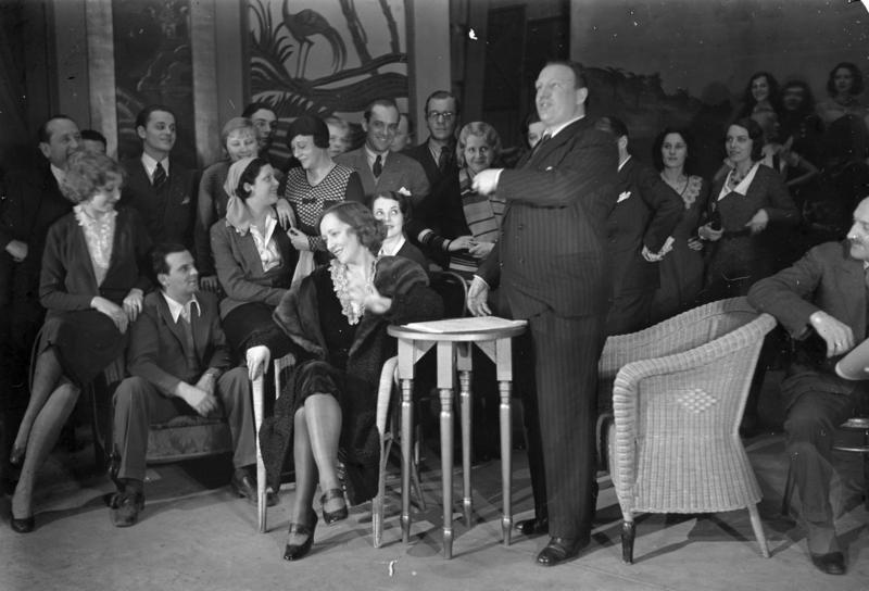 Richard Tauber, der bekannte deutsche Tenor singt wieder in Berlin. Der bekannte deutsche Tenor Richard Tauber auf einer Probe "Das Lied der Liebe" im Metropol-Theater in Berlin. Neben ihm links die bekannte Sängerin Anny Ahlers.